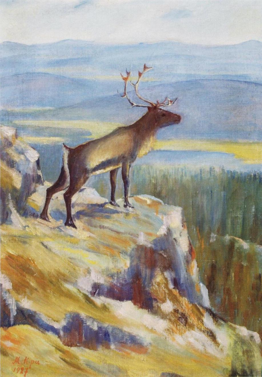 Maija Kellokummun maalaus, omistaja Rovaniemen taidemuseo.